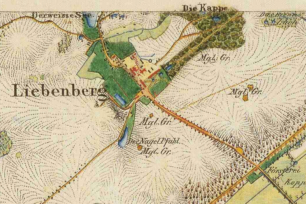 Karte von Liebenberg, Kreis Templin, Provinz Brandenburg, 1840